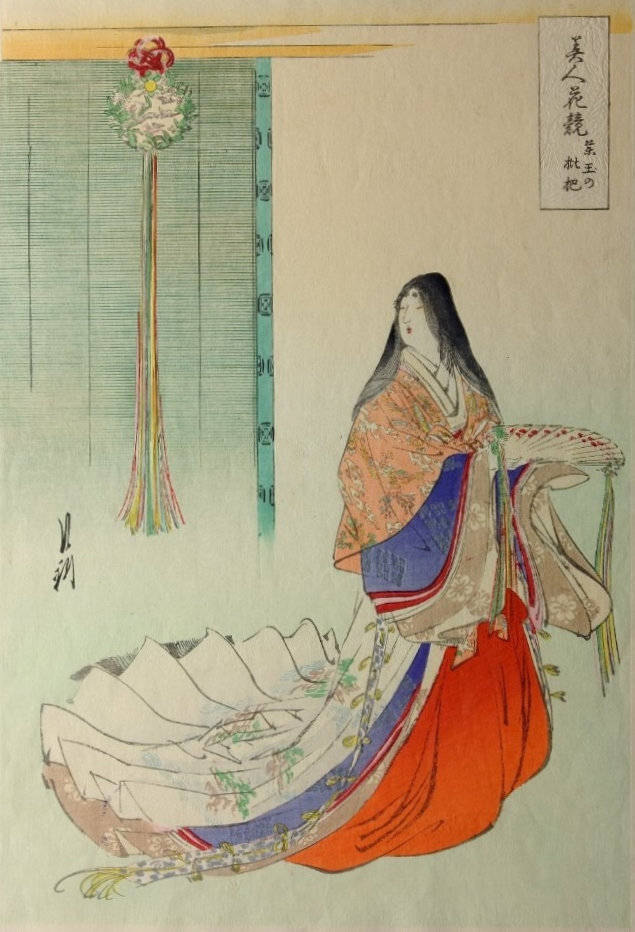 中文（香港）: 薬玉の枇杷 美人花競